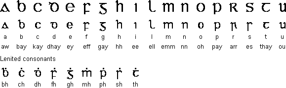 Буквы традиционного унциального письма для древнеирландского языка. Перезагрузил файл с английской википедии Image:Uncial_alphabet.png.